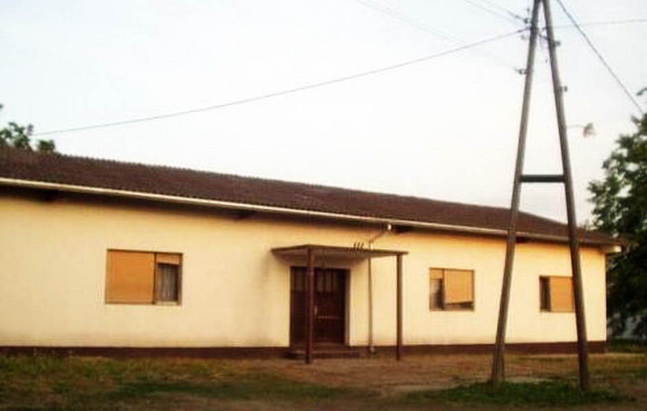 Gradečki Pavlovec - Dom Kulture